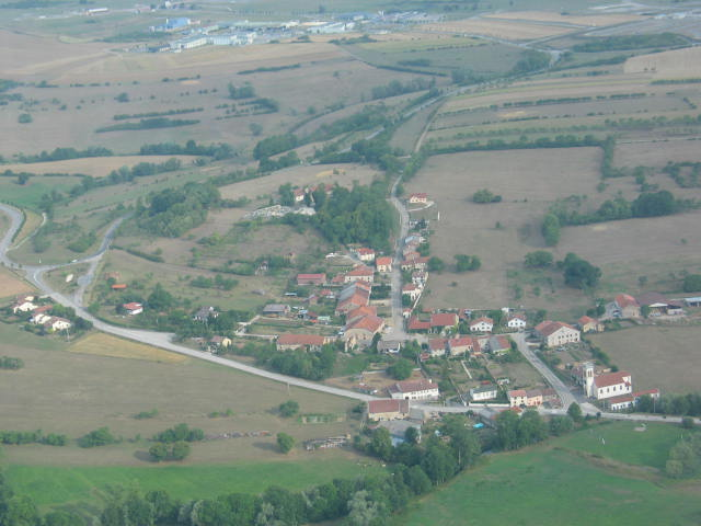 Vue aérienne de Domvallier avec en arrière plan l'Aéropôle Sud Lorraine.